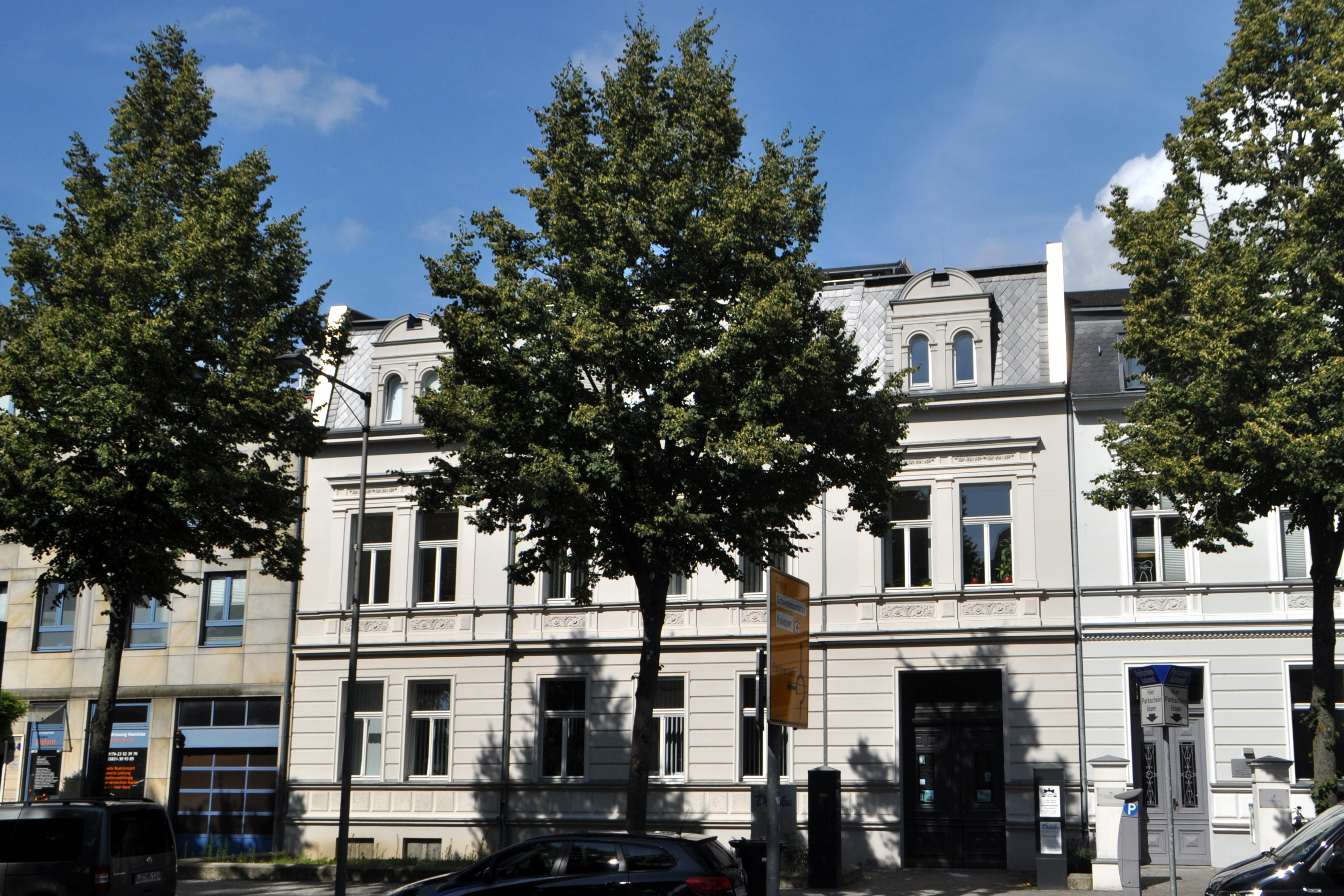 Stralsund, Olof-Palme-Platz 3, (2017-07-06) This is a photograph of an architectural monument.